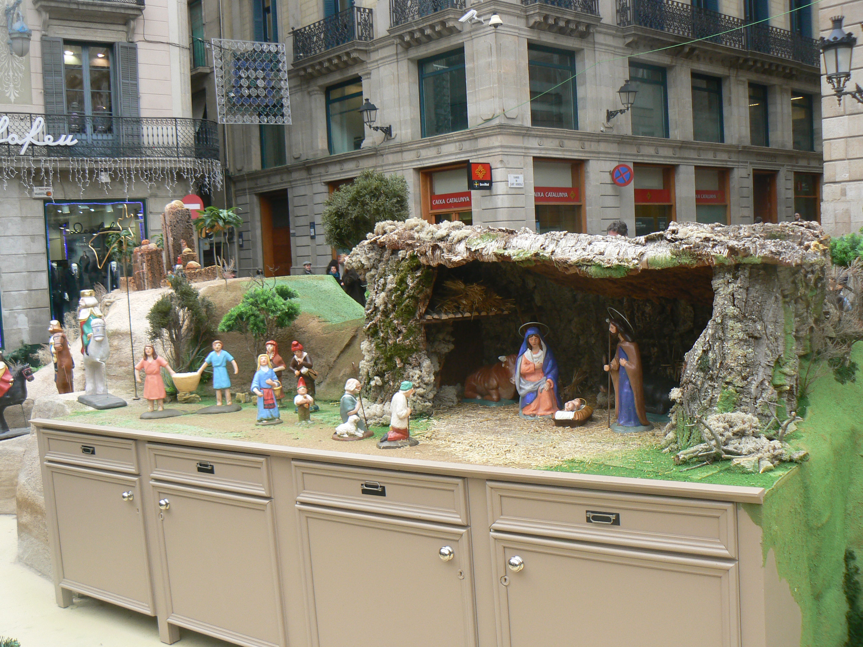 Pessebre tradicional català exposat el nadal de 2010-2011 a la plaça de Sant Jaume de Barcelona. Es tracta d'un pessebre amb figuretes típiques de fang i que imita els que es fan a les cases sobre un moble o una taula.